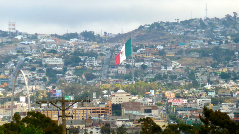 Vista panorámica de Tijuana, México.